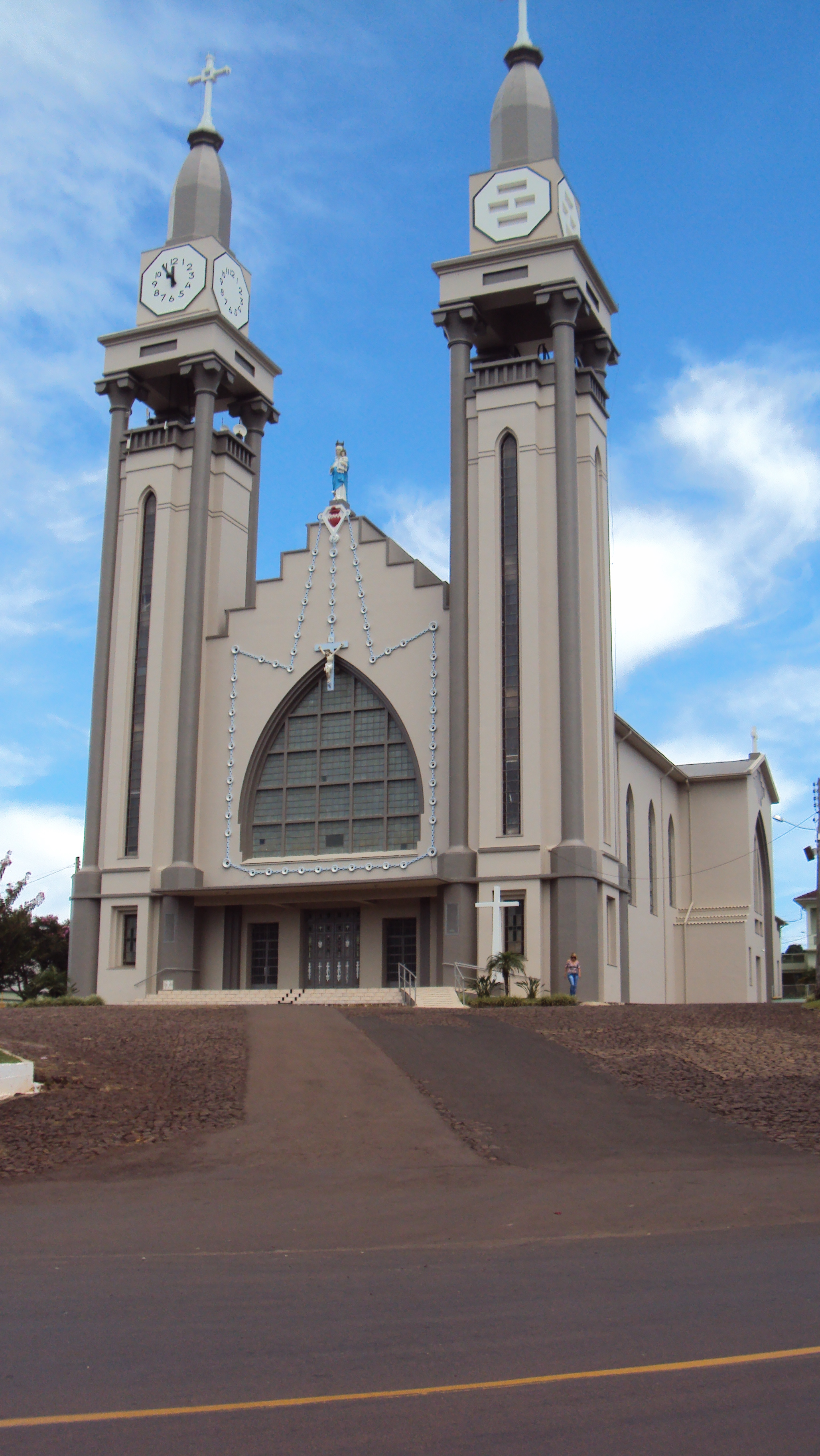 Igreja Matriz de Barão de Cotegipe, em 2 de março de 2014.